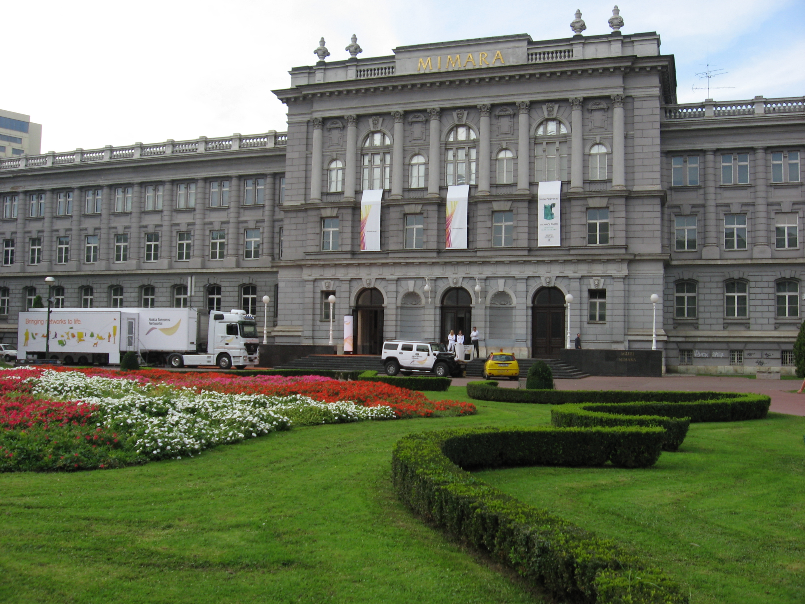 Muzej Mimara (Mimara museum).